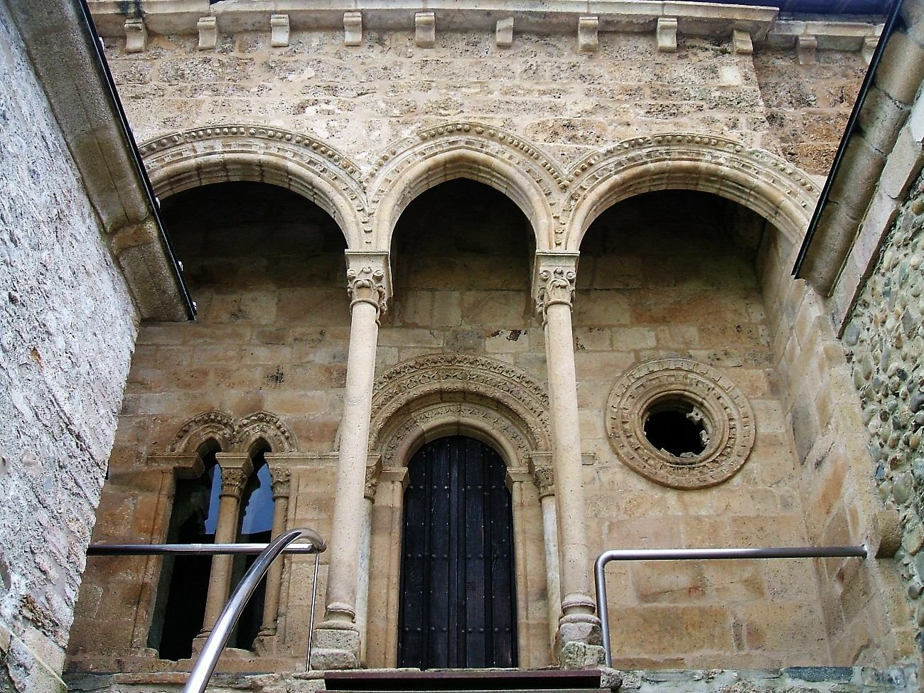 Mirador de la Reina, Monasterio de Santa María de Carracedo, en Carracedo del Monasterio, León, España